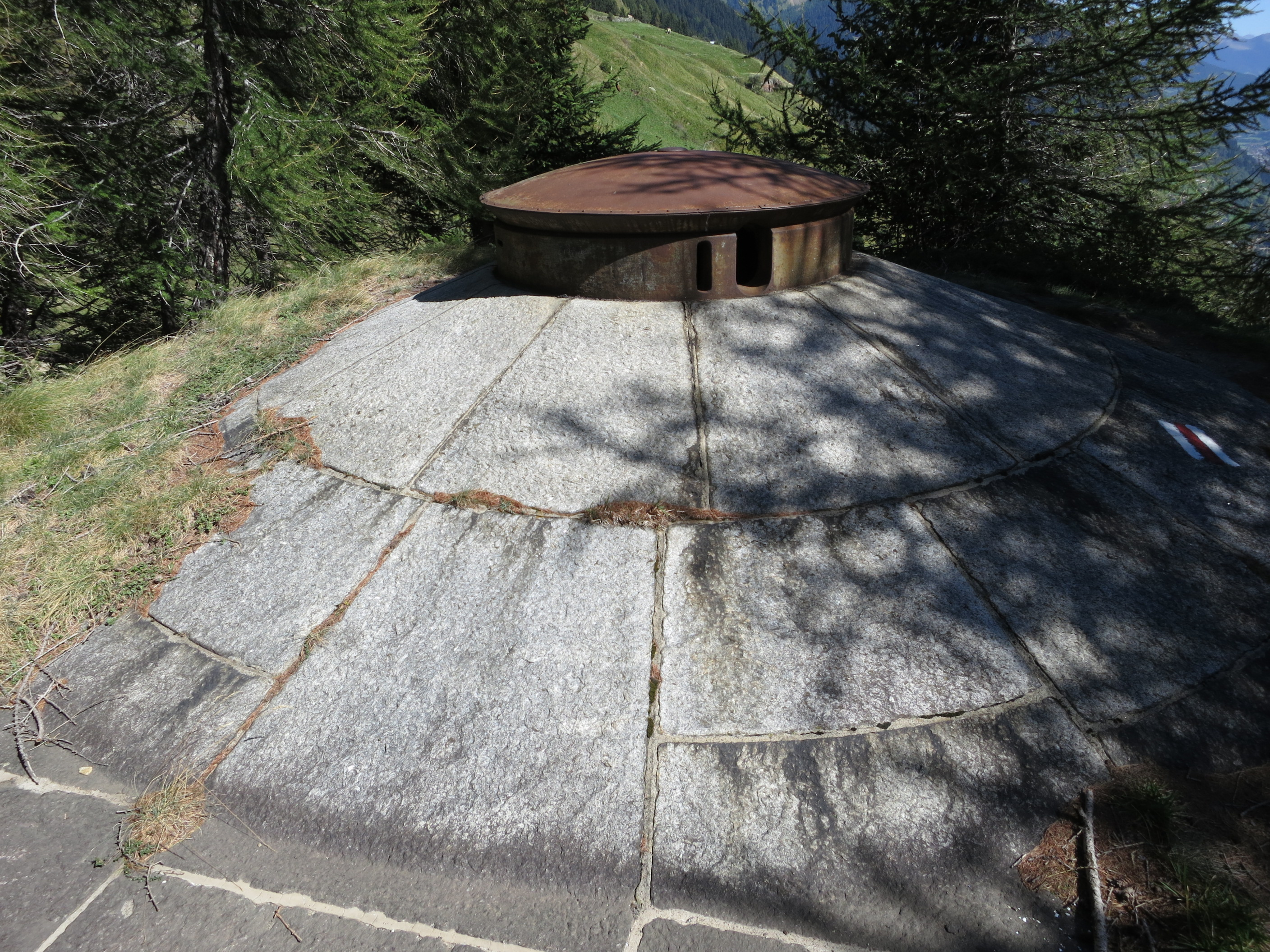 Fort Motto Bartola, Airolo, Schweiz